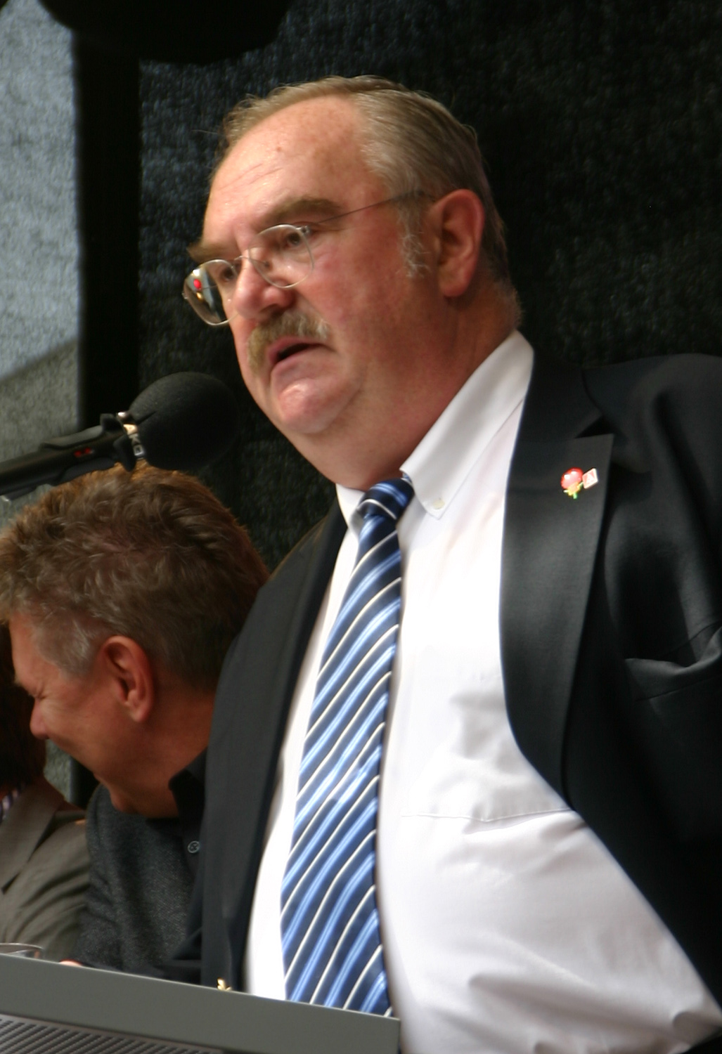 Werner Neugebauer, deutscher Gewerkschafter, hier bei seiner Rede am 1. Mai 2010 auf dem Münchner Marienplatz